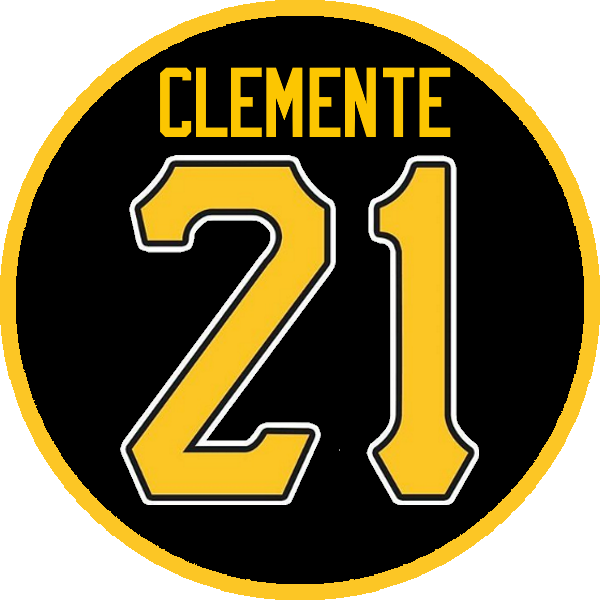 Illustration of Pittsburgh Pirates retired number